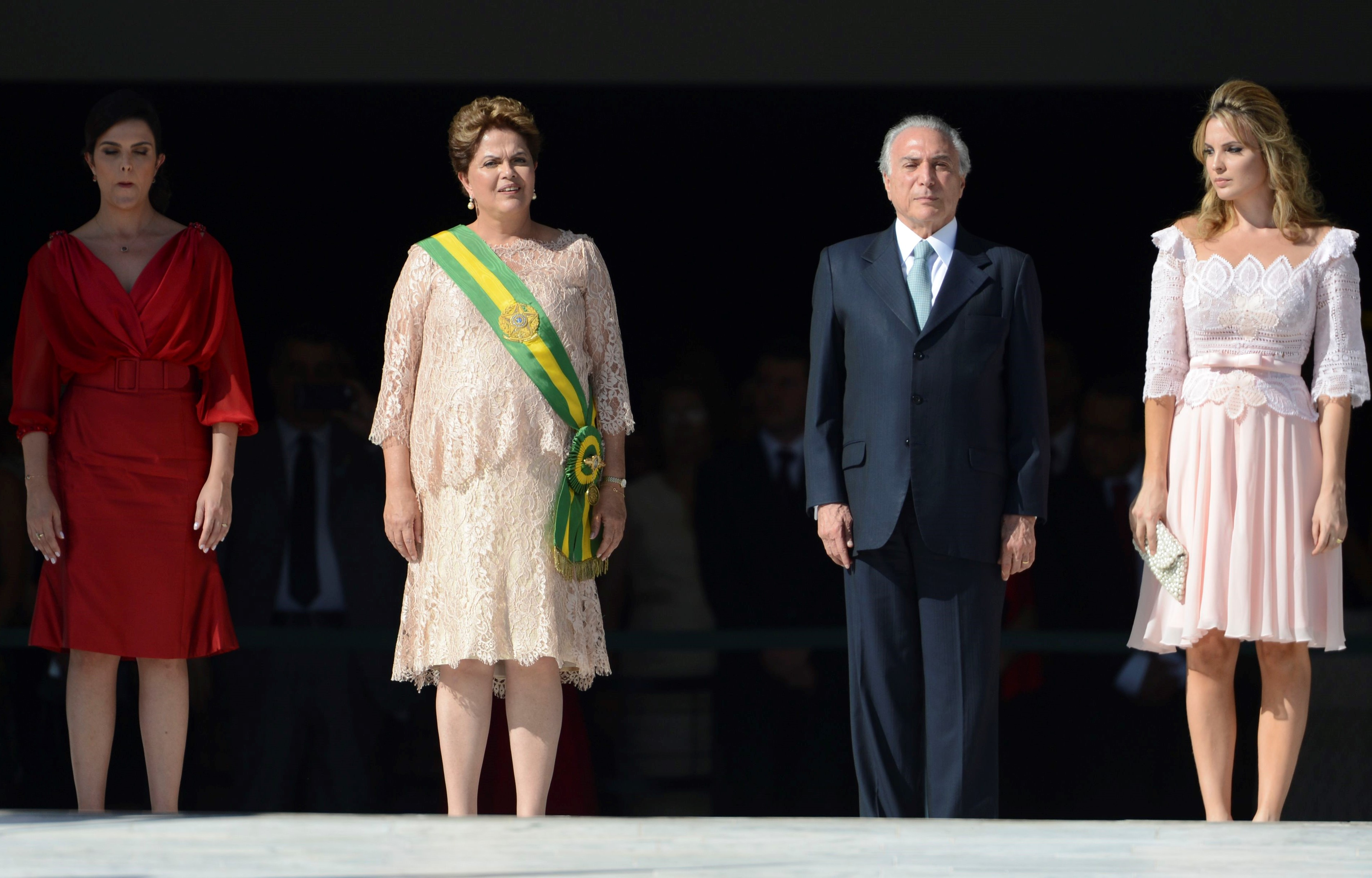 Posse de Dilma, com as bordas cortadas